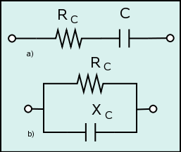 Circuitos equivalentes del condensador (capacitor's equivalent circuits)